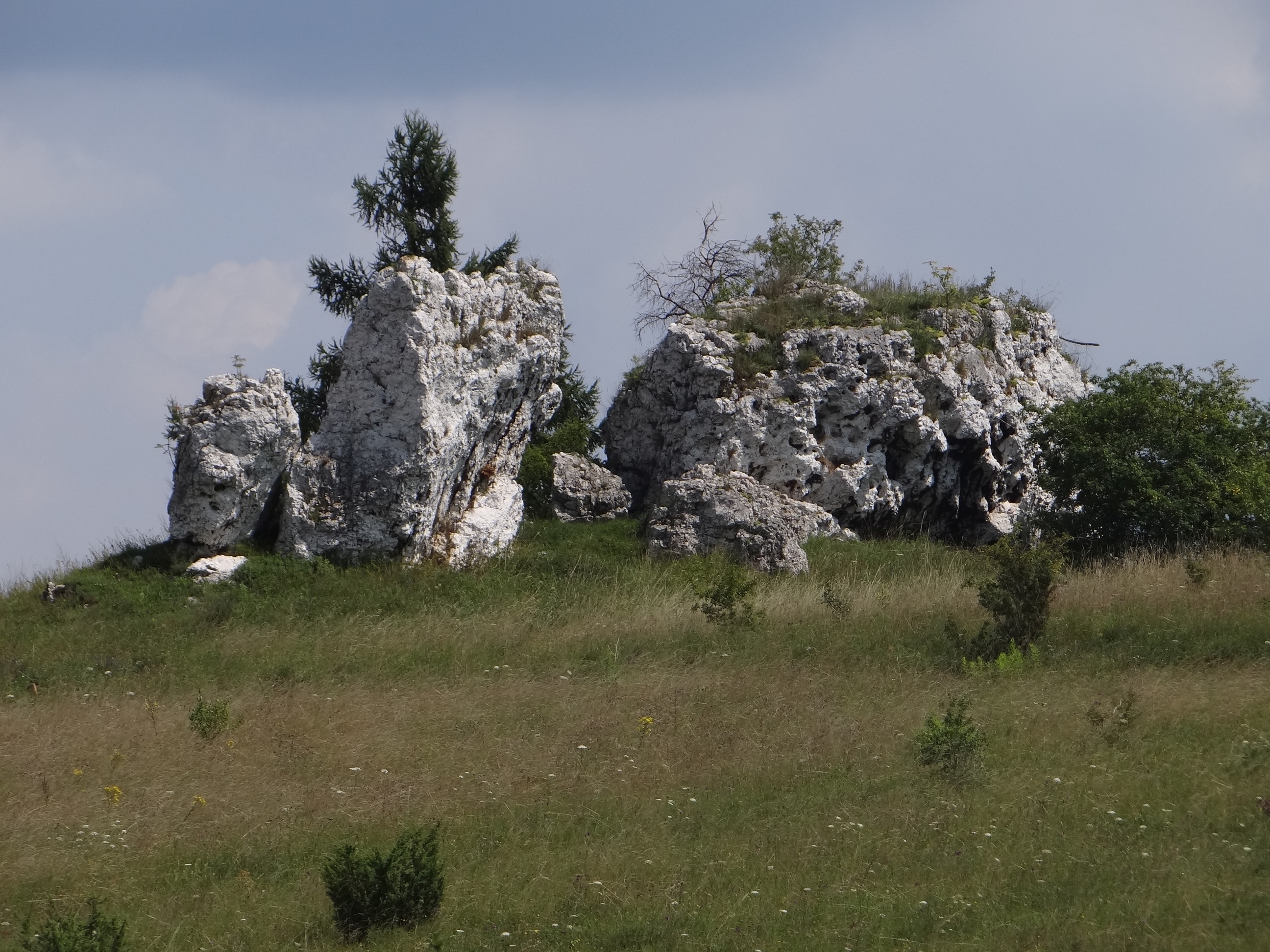 Skałki w Przewodziszowicach